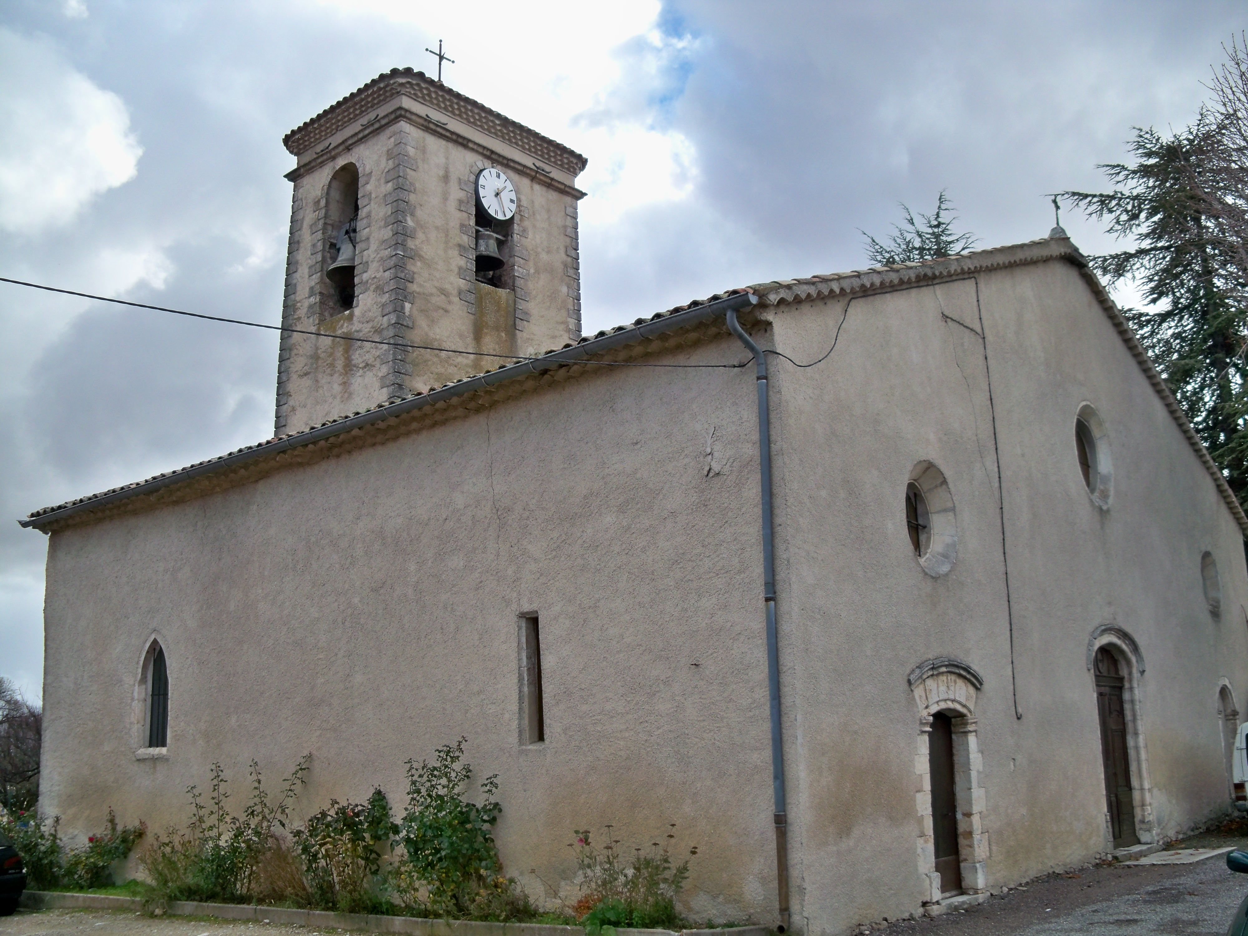 église de Revest du Bion, Alpes de Haute Provence, France